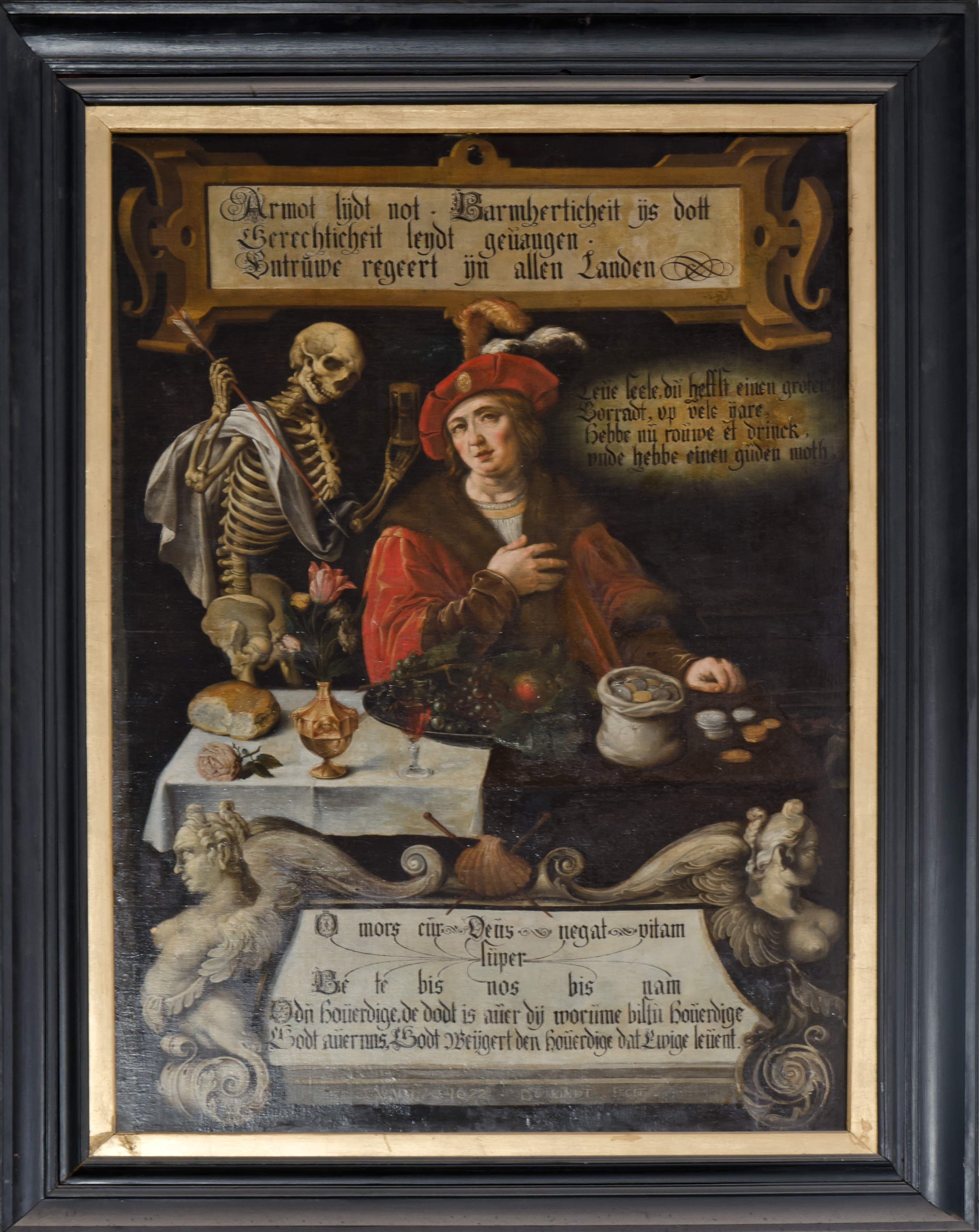 St.Jakobi Hamburg "Der reiche Mann und der Tod", 1622